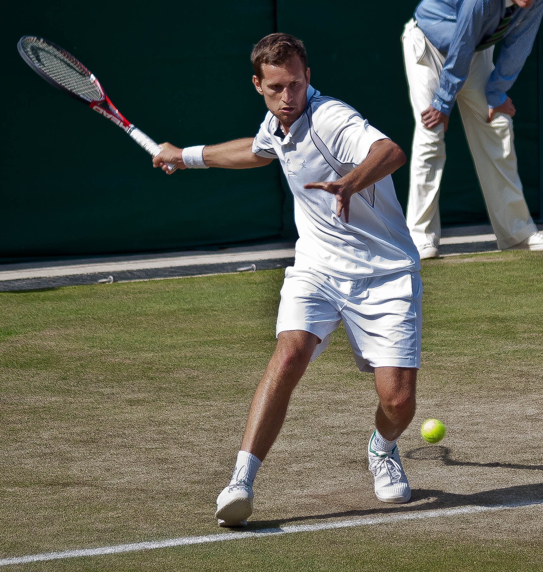 Karol Beck